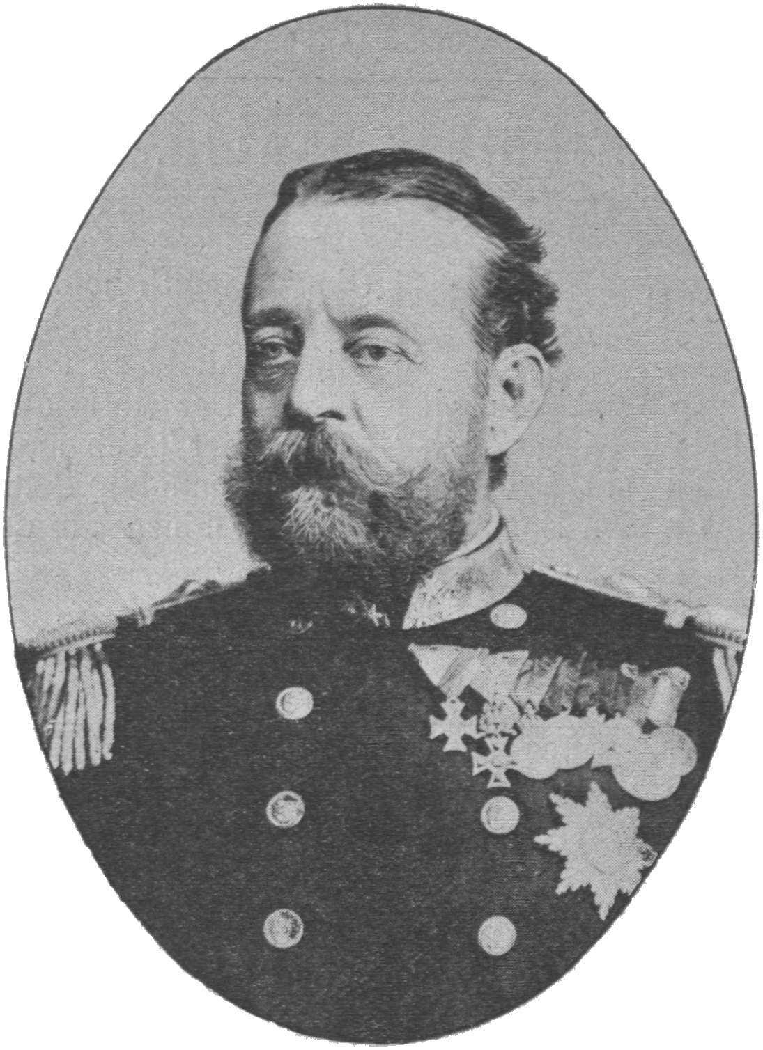 Maximilian Daublebsky Freiherr von Sterneck zu Ehrenstein (Maximilian Freiherr von Sterneck; 1829-1897), Austrian-Hungarian admiral